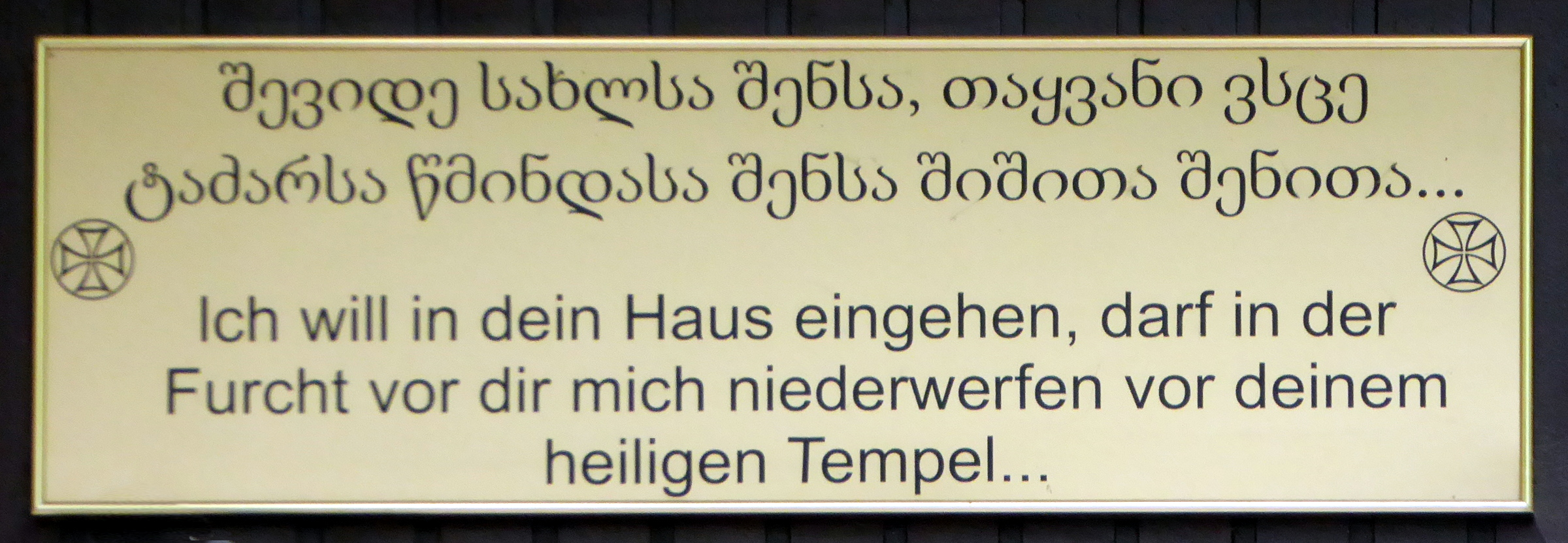 Tafel über dem Eingang der georgisch-orthodoxen Wachtang-Gorgassali-Kirche in München, Text nach Psalm 5, 7/8.